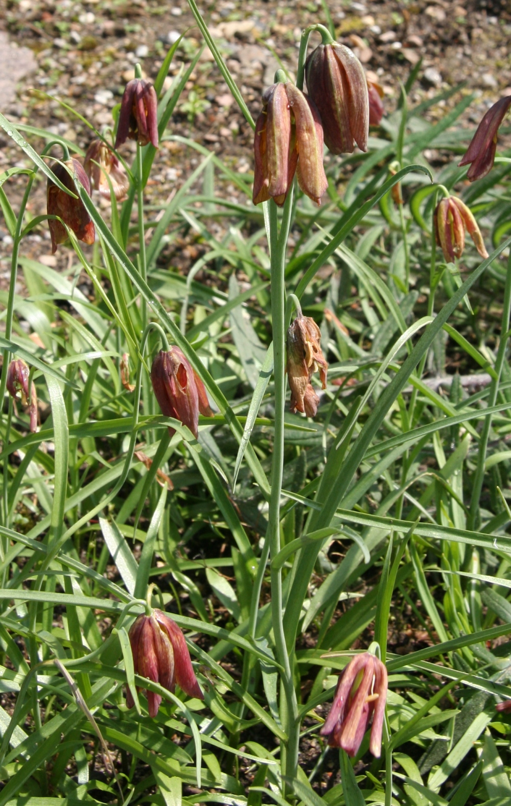 Fritillaria messanensis im Botanischen Garten Dresden